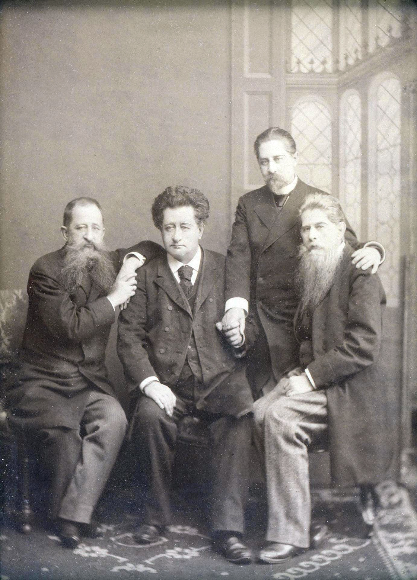 Портрет сыновей архитектора Андрея Ивановича Штакеншнейдера. 1897